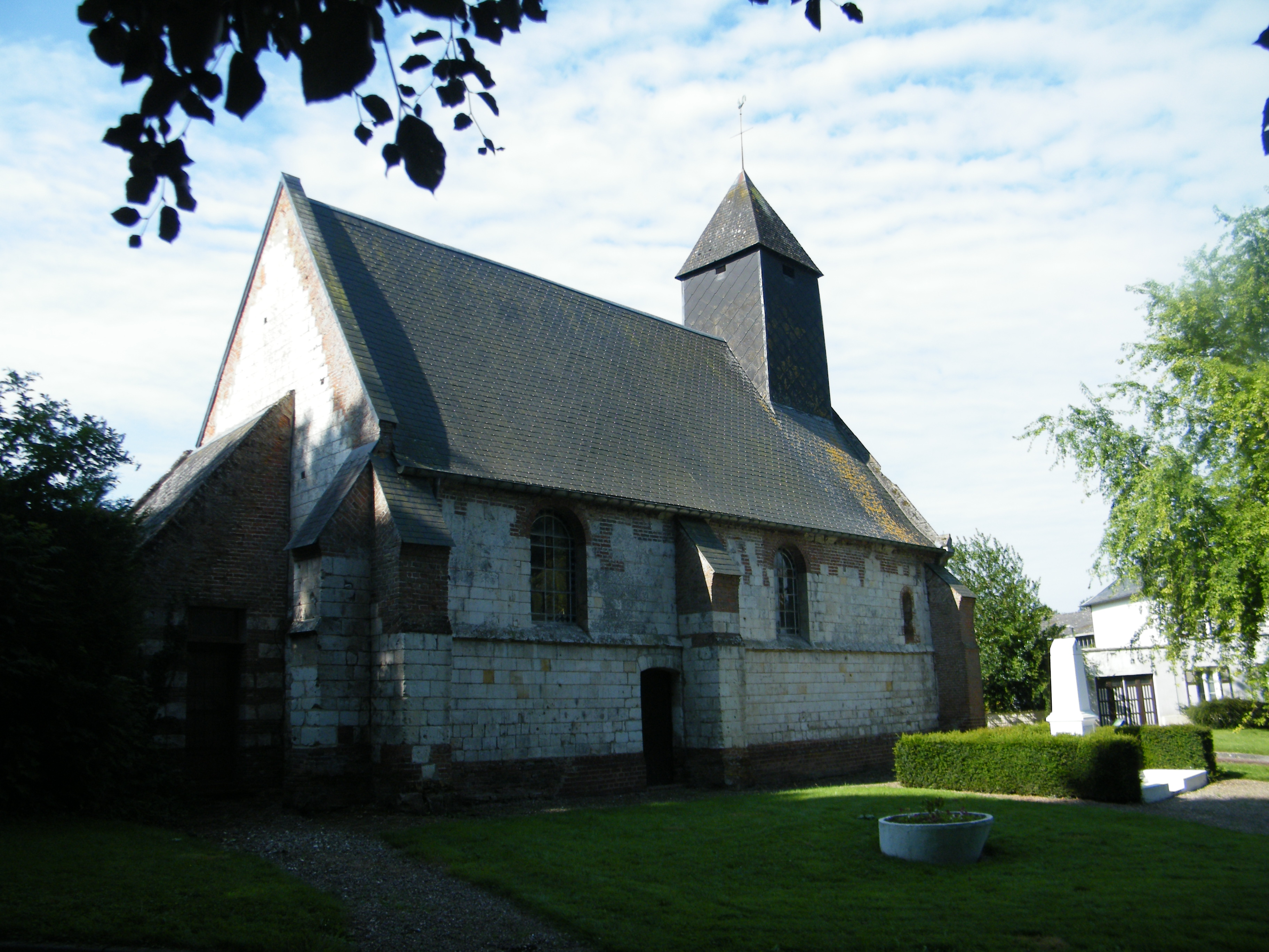 église.